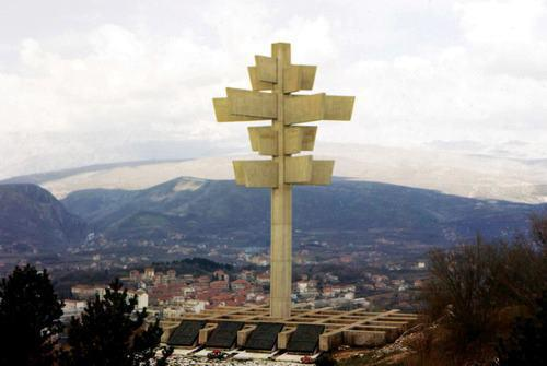 spomenik iznad knina pre rusenja